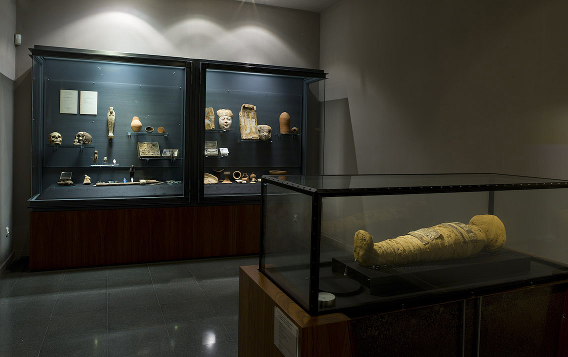 La Biblioteca Museu Víctor Balaguer va néixer a finals del segle XIX amb la voluntat d%u2019oferir al públic l%u2019oportunitat de veure reunides múltiples col·leccions d%u2019art, llibres i etnografia que Víctor Balaguer havia atresorat al llarg de la seva vida.